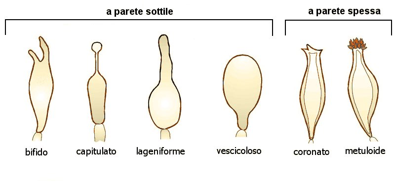 cistidia, fungi structures